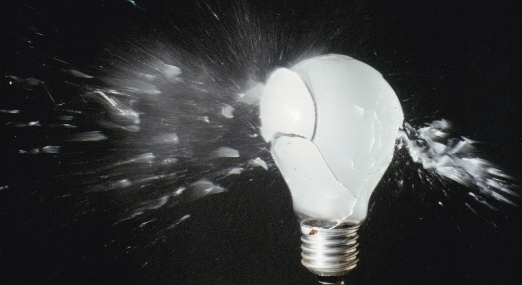 Hochgeschwindigkeitsaufnahme vom Schuss eines Luftgewehrs durch eine Glühlampe. Methode: Abgedunkelter Raum, offene Blende, Auslösung des Elektronenblitzgerätes durch das Projektil (Unterbrechung eines elektrischen Kontaktes)